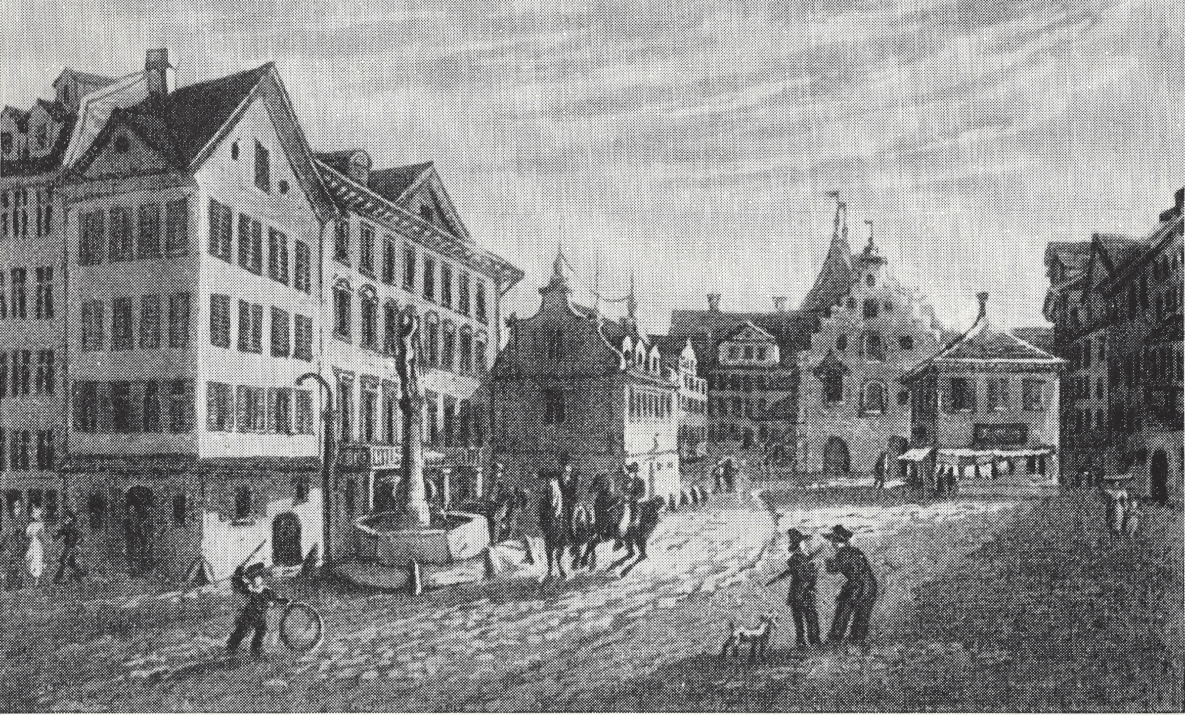 Der Bool (Marktplatz) in St. Gallen, um 1830. Von links nach rechts: Gasthaus zum Hecht (heute Restaurant und Kino), Zeughaus (abgerissen, heute McDonalds-Filiale), Haus Notenstein, Kaufhaus (Waaghaus), Sängerhäuschen (abgerissen).